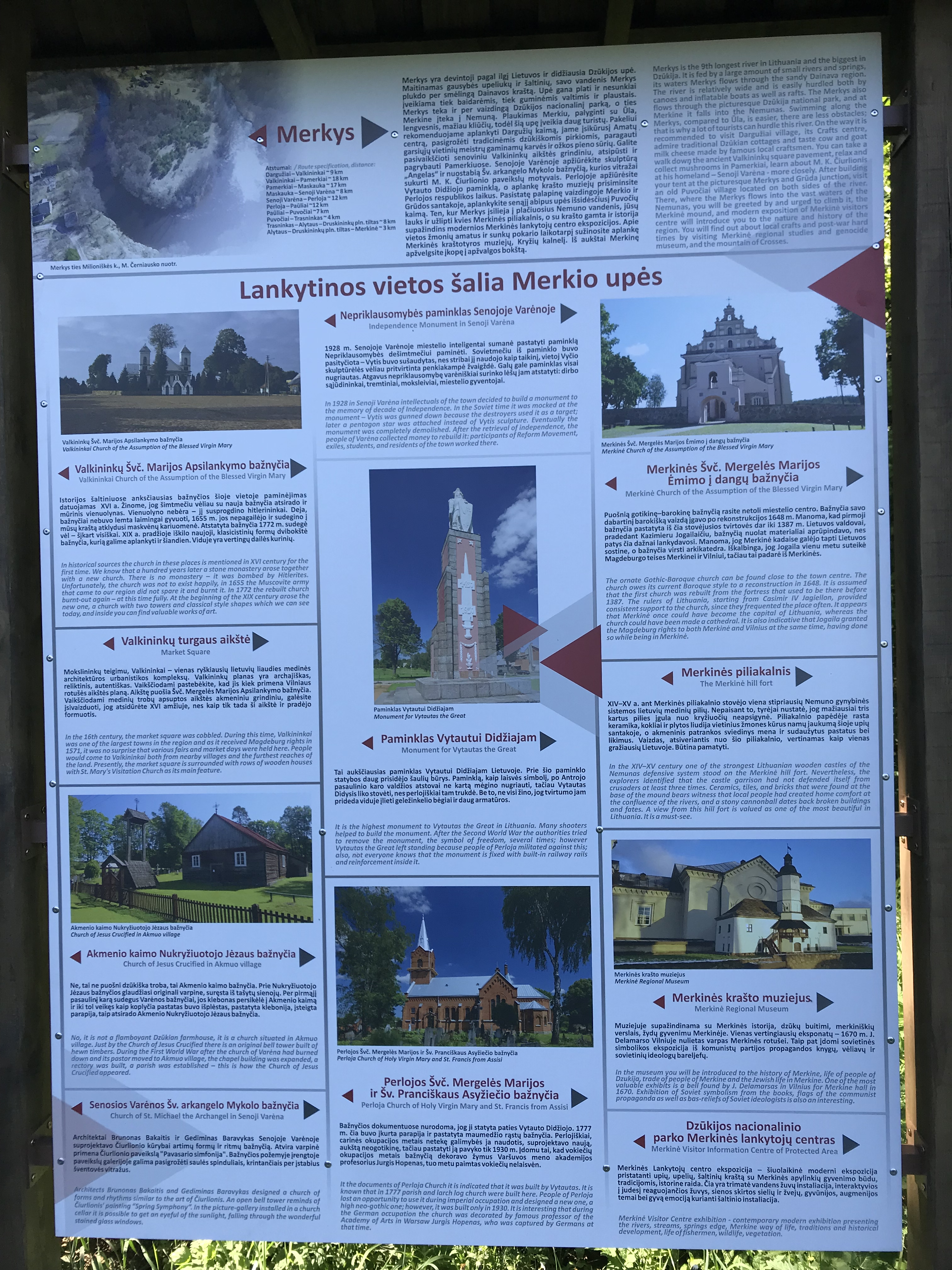 Dit paneel staat aan de oever van de Merkys, in het dorp Milioniškės.Foto genomen tijdens een wandelproject van Amsterdam naar Moskou